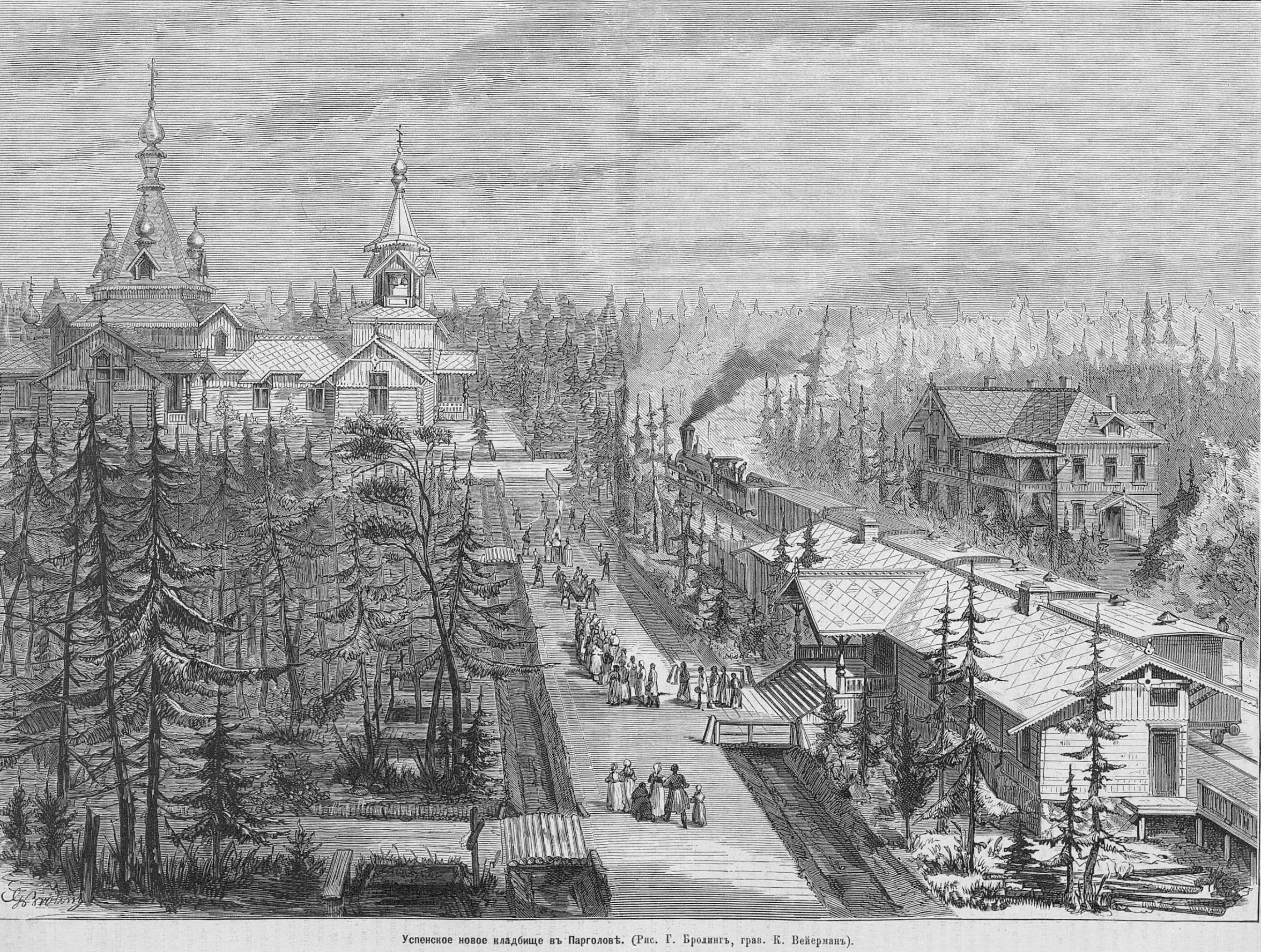 Успенское кладбище в Санкт-Петербурге, 1875 год